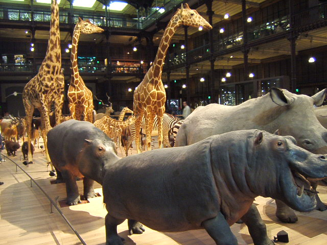 Photo par l'auteur au museum d'histoire naturelle